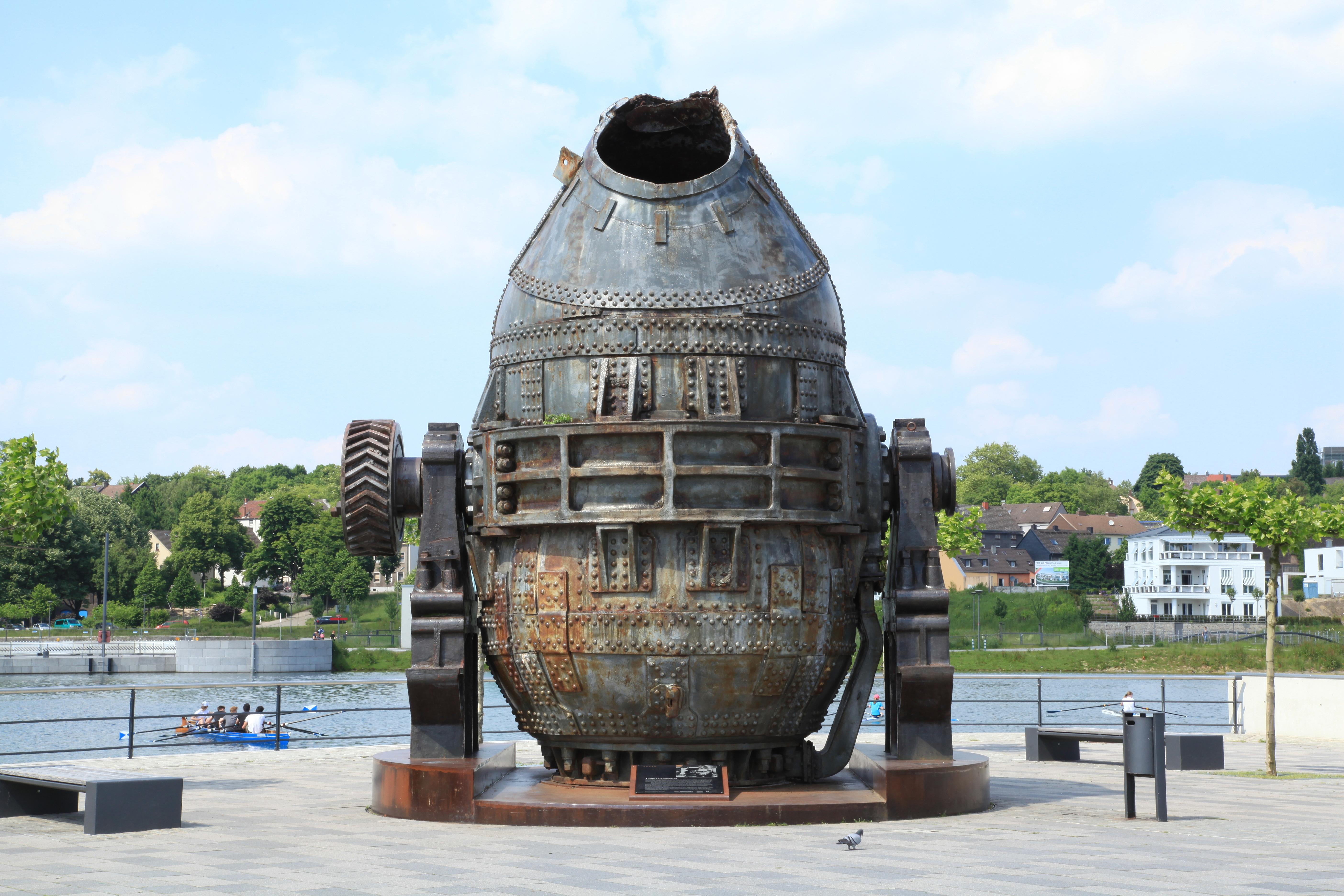 Thomas-Birne auf der Kulturinsel, Am Kai in Dortmund